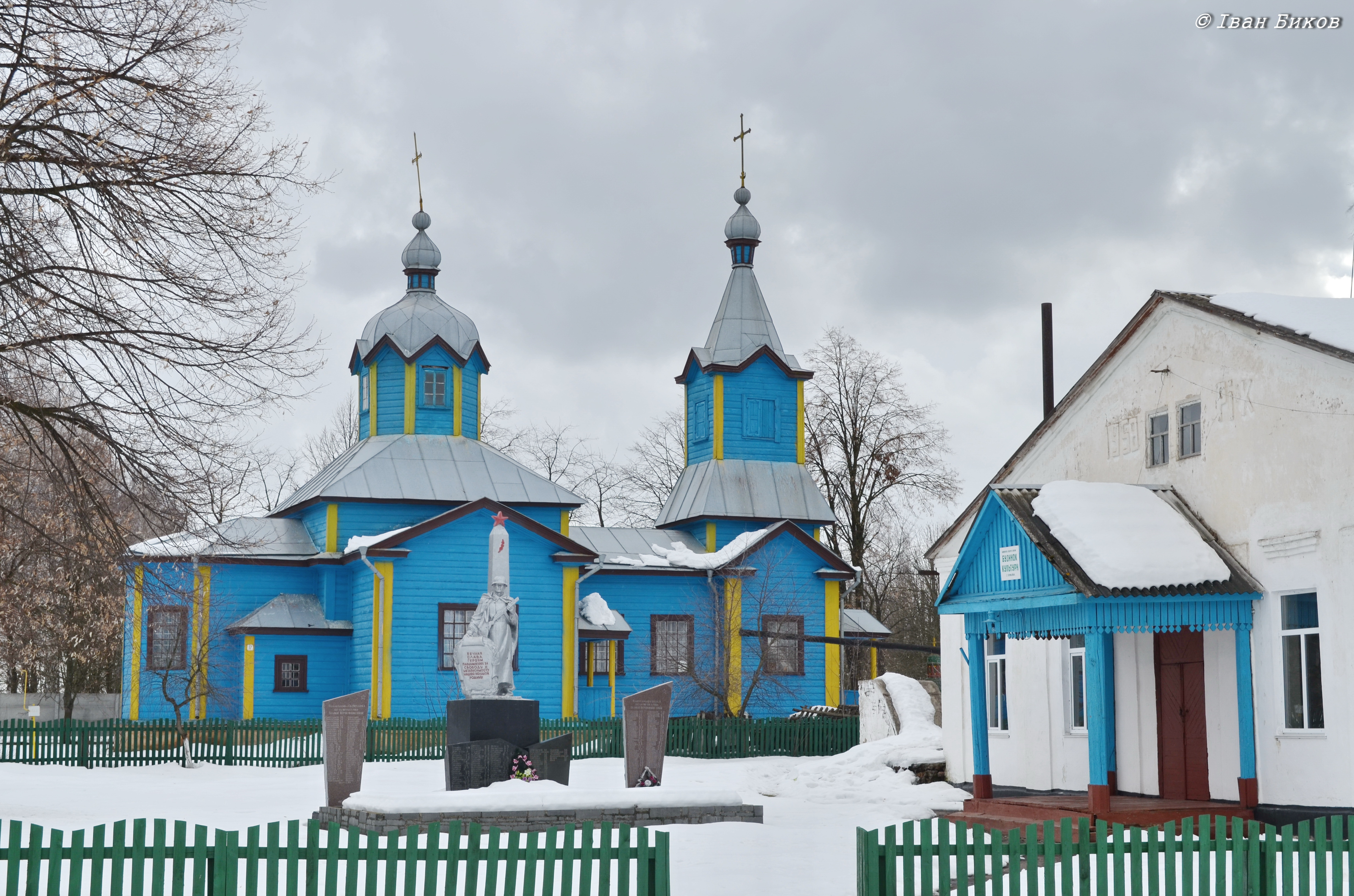 Скригалівка. Покровська церква. 1893 р. Історизм